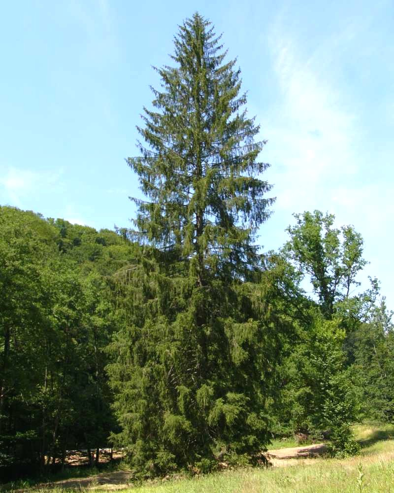 Gemeine Fichte (Picea abies)